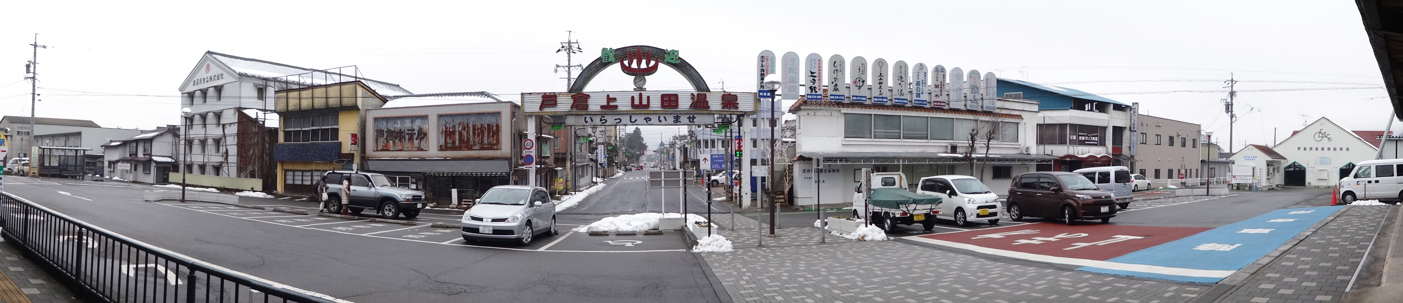 しなの鉄道戸倉駅前パノラマ写真